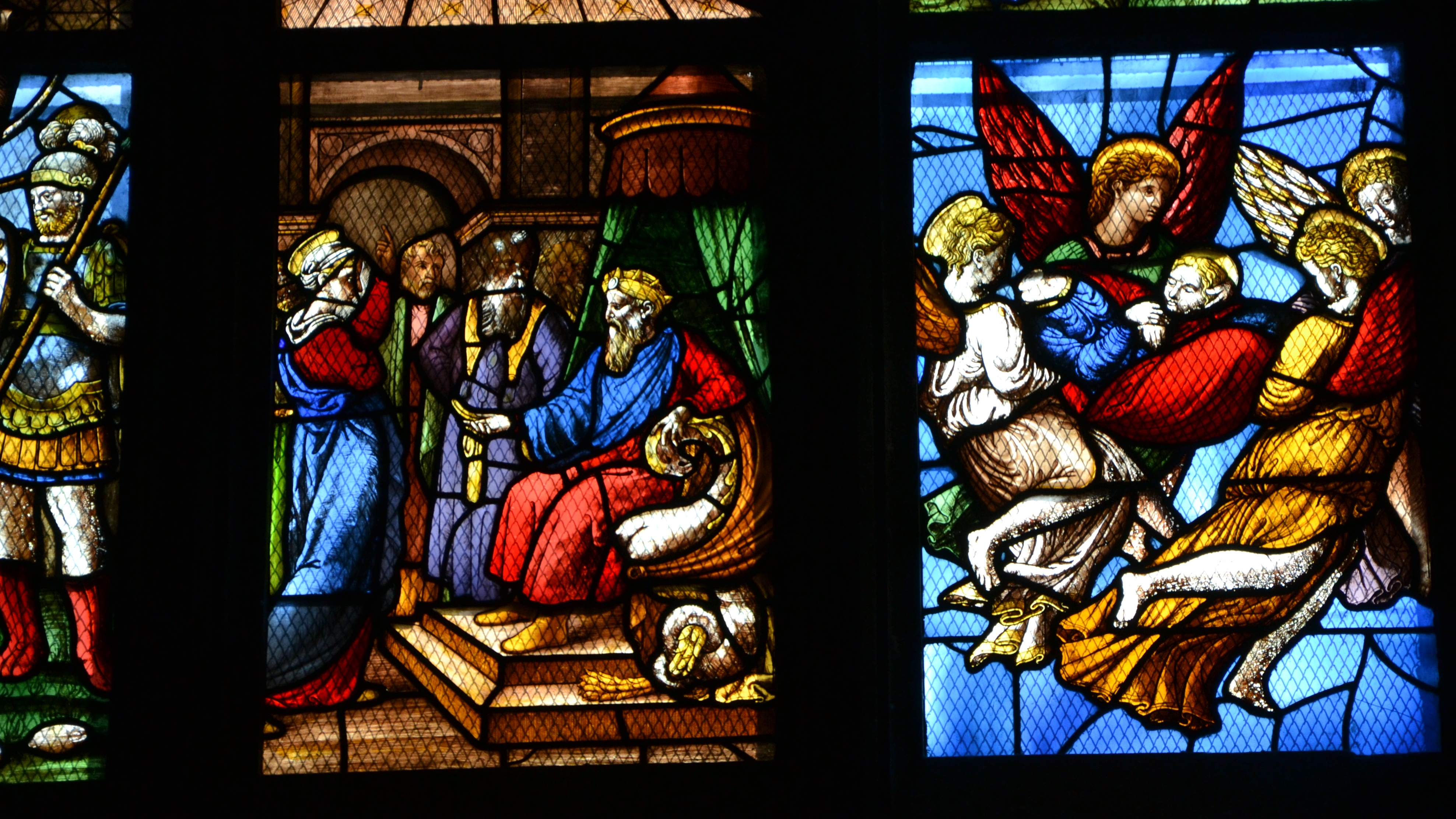 Milano, Duomo, Vetrata di santa Caterina, Braccio sud del transetto, XVI secolo disegnata da Biagio e Giuseppe Arcimboldi e realizzata da Corrado de' Mochis